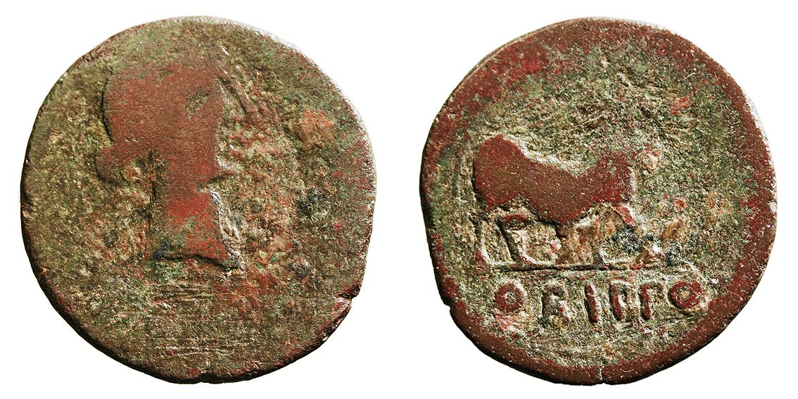 As de bronce emitido en Orippo, cerca de la actual Dos Hermanas (provincia de Sevilla, España). En el reverso muestra un toro y debajo la inscripción "ORIPPO".